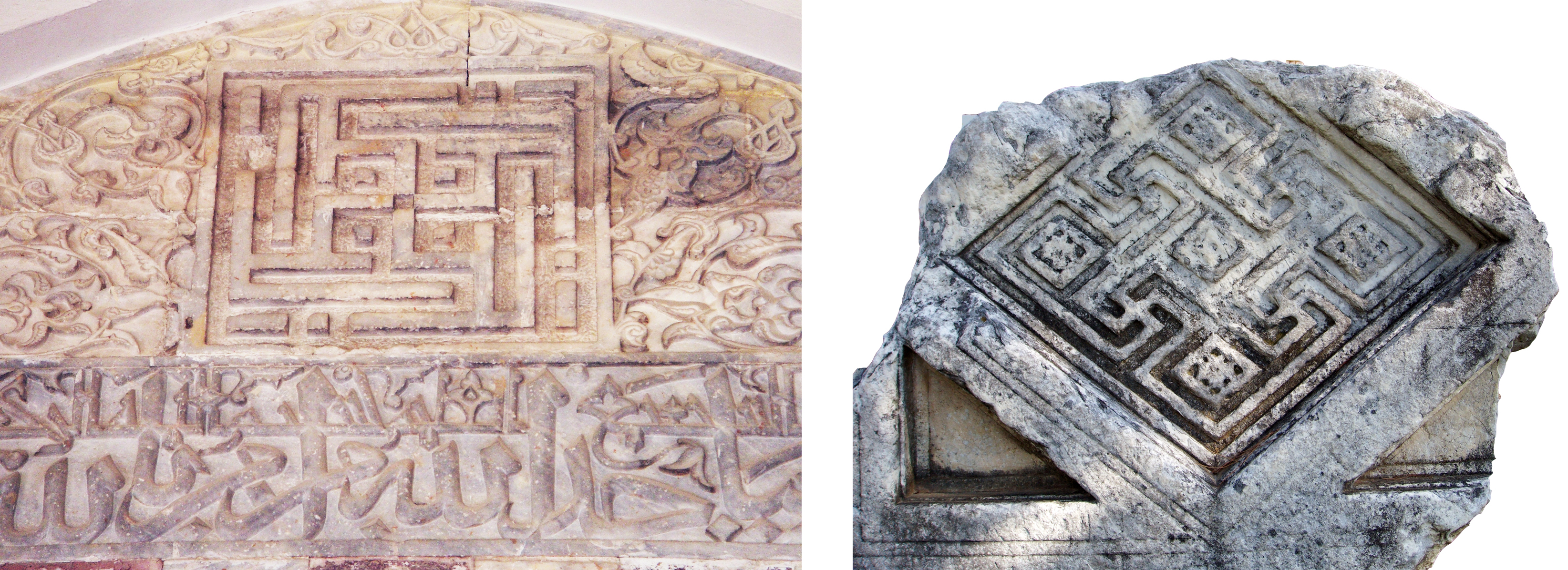 Milas